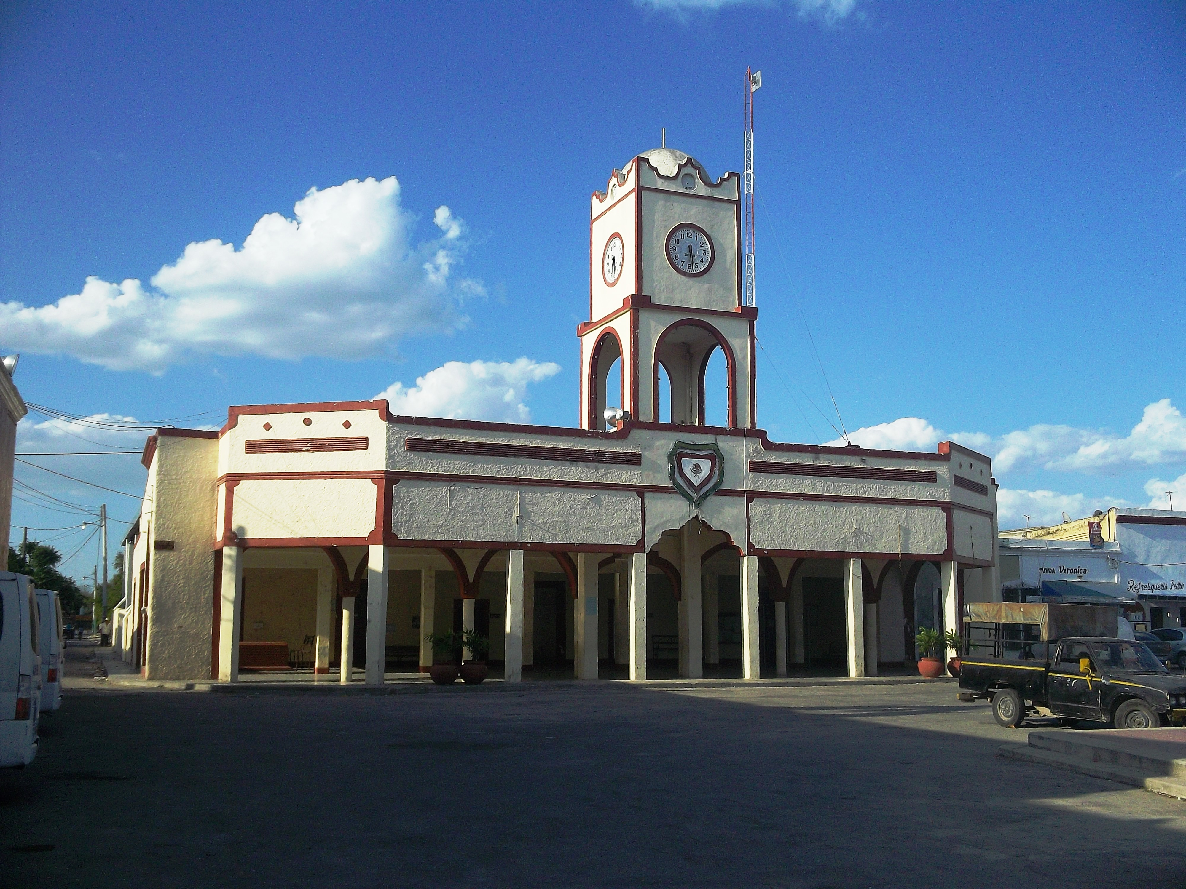 Palacio municipal de Baca, Yucatán.